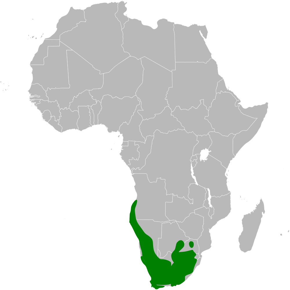 Certhilauda distribution map (png)